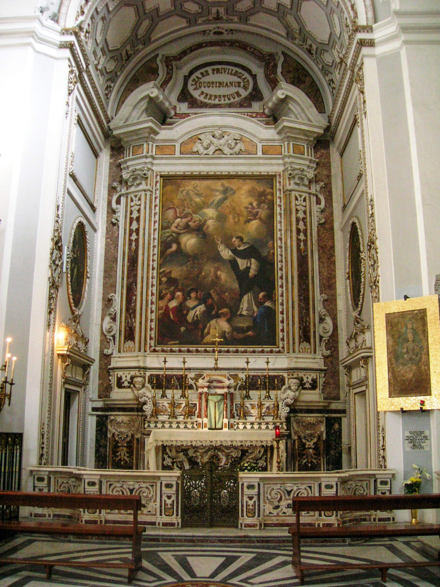 Basilica di Santa Maria della Sanità